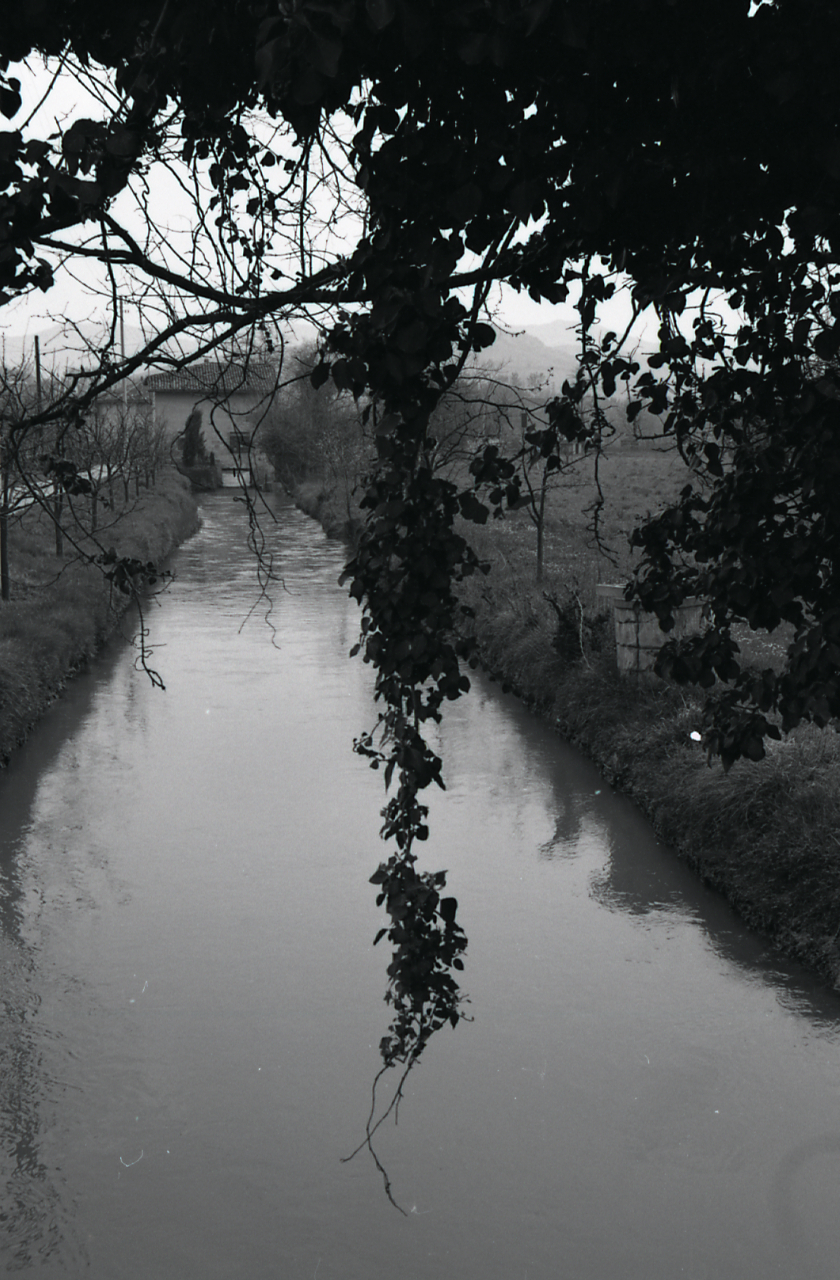 Servizio fotografico : Imola, 1974 / Paolo Monti. - Strisce: 6, Fotogrammi complessivi: 34 : Negativo b/n, gelatina bromuro d'argento/ pellicola ; 35 mm. - ((Sul portanegativi: N[I]K[MA]T PanF. - Occasione: Documentazione per la pubblicazione: Varignana Franca, 2, "Mappe agricole e urbane del territorio bolognese dei secoli 17. e 18" in "Le collezioni d'arte [...]", Bologna, Cassa di Risparmio di Bologna-Edizioni Alfa, 1974. - Fonte: Agenda di Paolo Monti: Leica 1501-3000 Controllo numerazione (1950-1978), presso Archivio Paolo Monti. - Fonte: Monografia di Varignana Franca (a cura di): 2, Mappe agricole e urbane del territorio bolognese dei secoli 17. e 18 in Le collezioni d'arte della Cassa di Risparmio in Bologna, Bologna, Cassa di Risparmio di Bologna-Edizioni Alfa (1974). - Fonte: Fattura di Paolo Monti: IV. Commesse/ Fattura n. 13 (1974/06/24), presso Archivio Paolo Monti